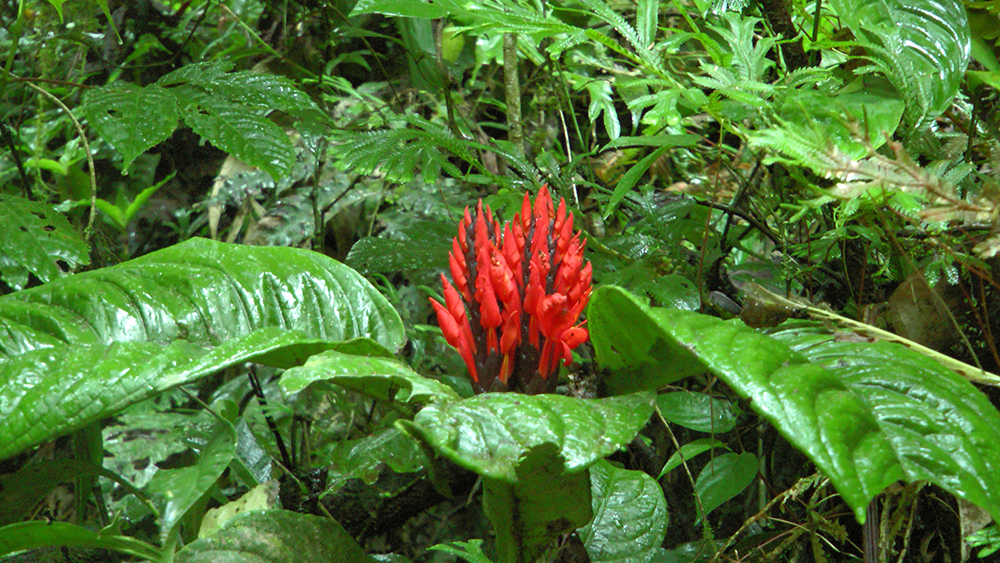 FLOR ENDÉMICA DE UCHIZA